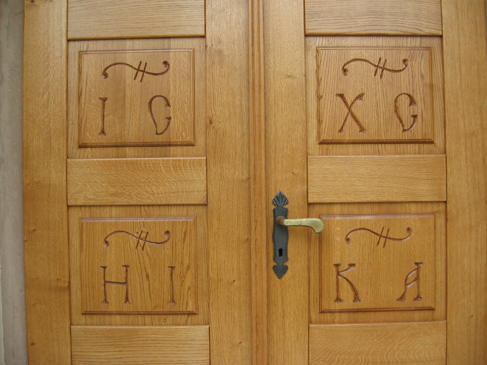 Church sv Cirila in Metoda Metlika, detail